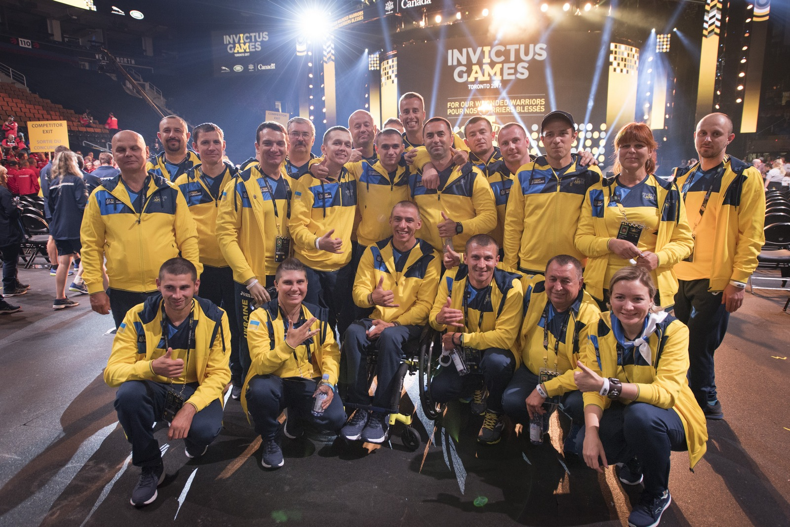 Українська збірна завершила змагання у «Іграх Нескорених» з 14 медалями